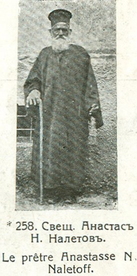 Анастас Налетов